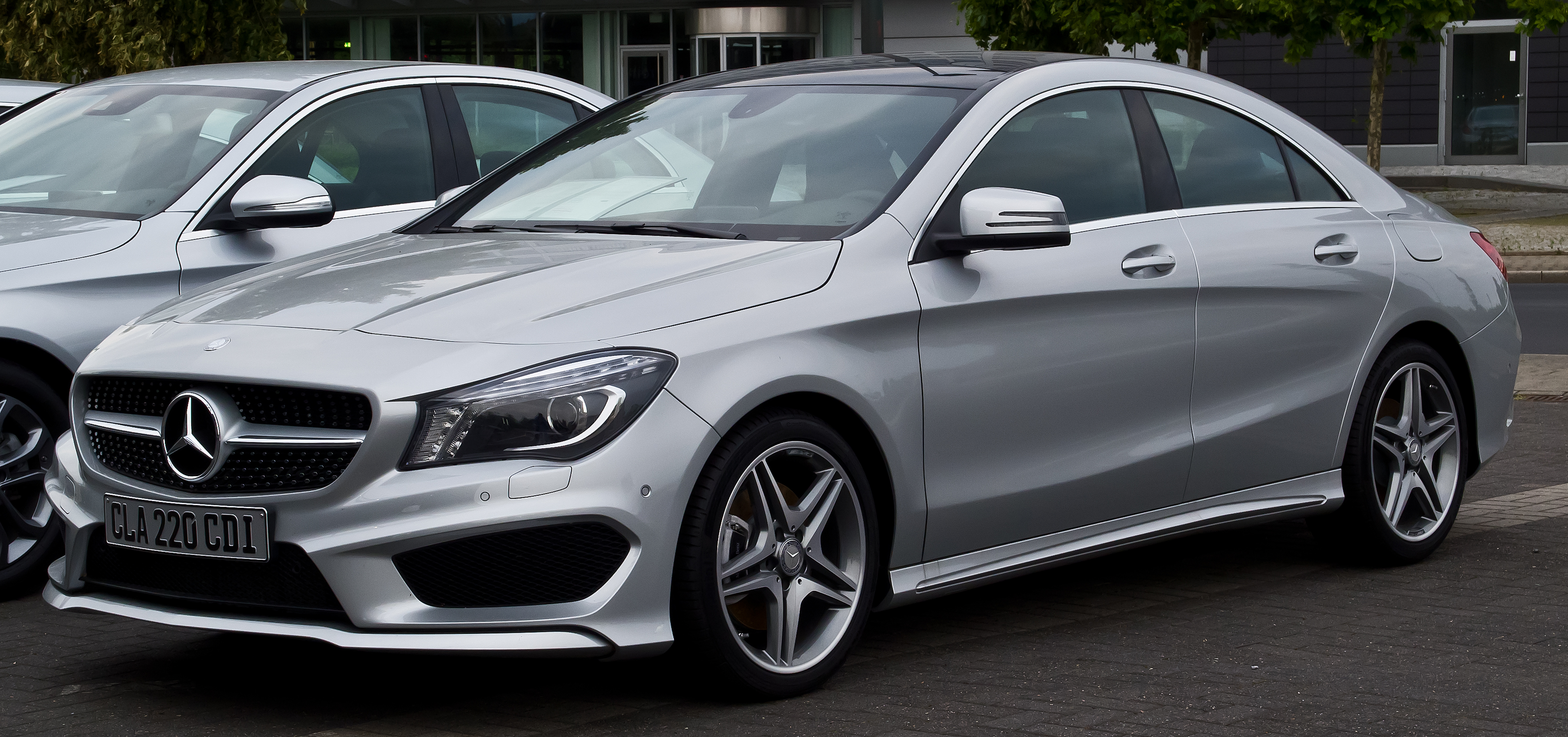 Mercedes-Benz CLA 220 CDI AMG Line (C 117)